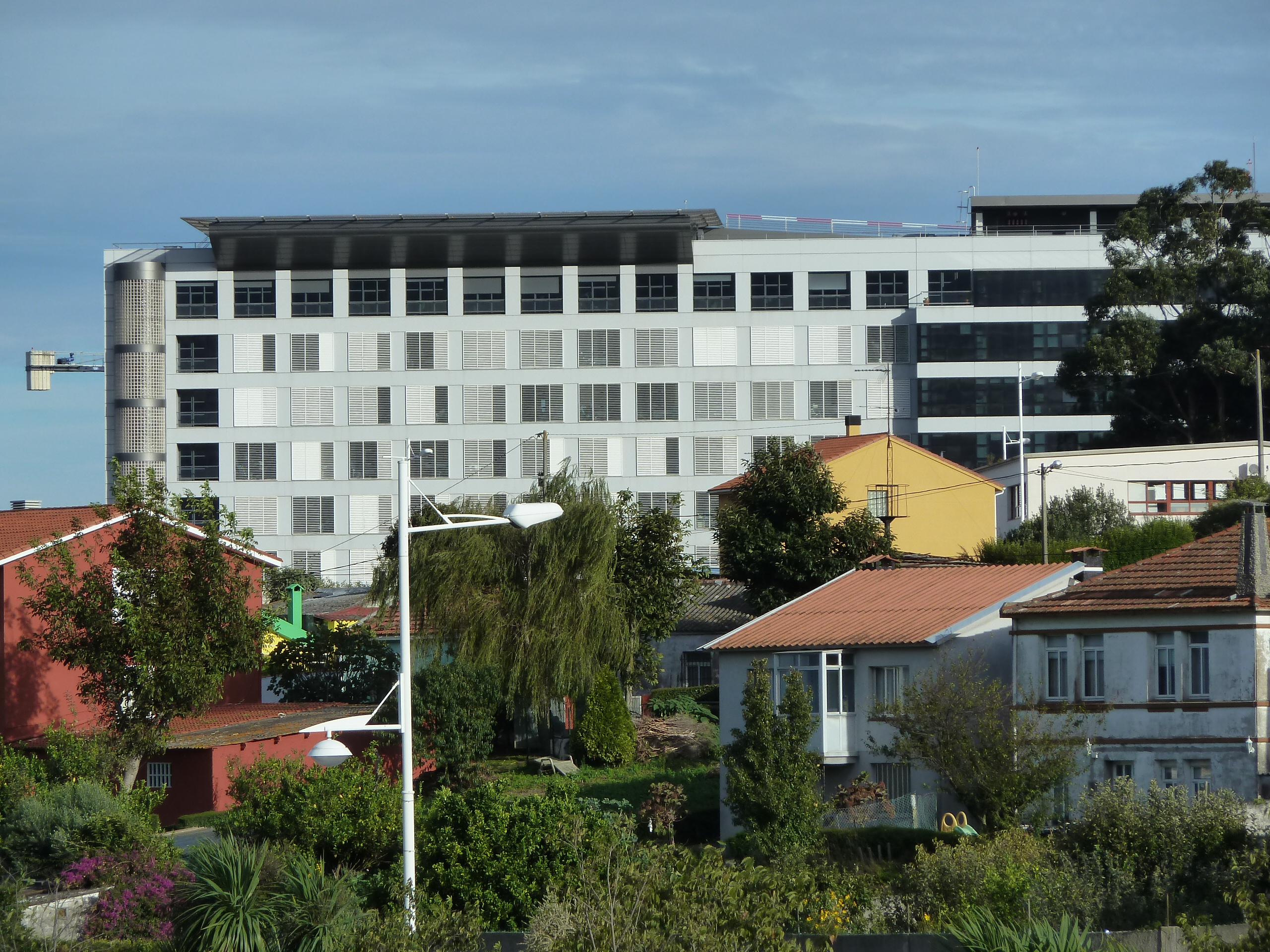 Hospital A Coruña. Vista dende o parque de Eirís.